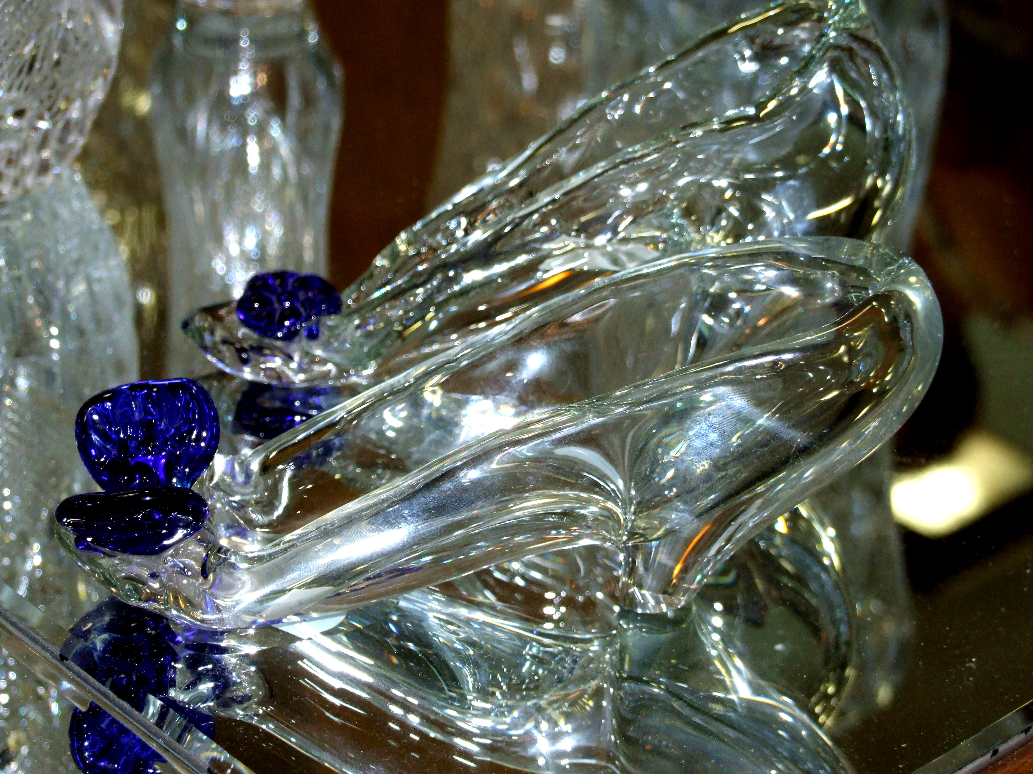 Cinderella shoes